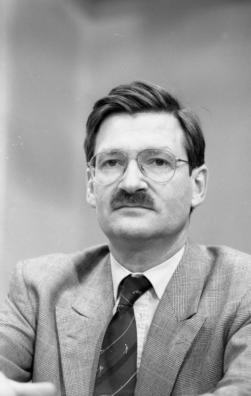 10.1.1991 Sitzung der FDP-Bundestagsfraktion im Bundeshaus (Neues Abgeordneten-Hochhaus).